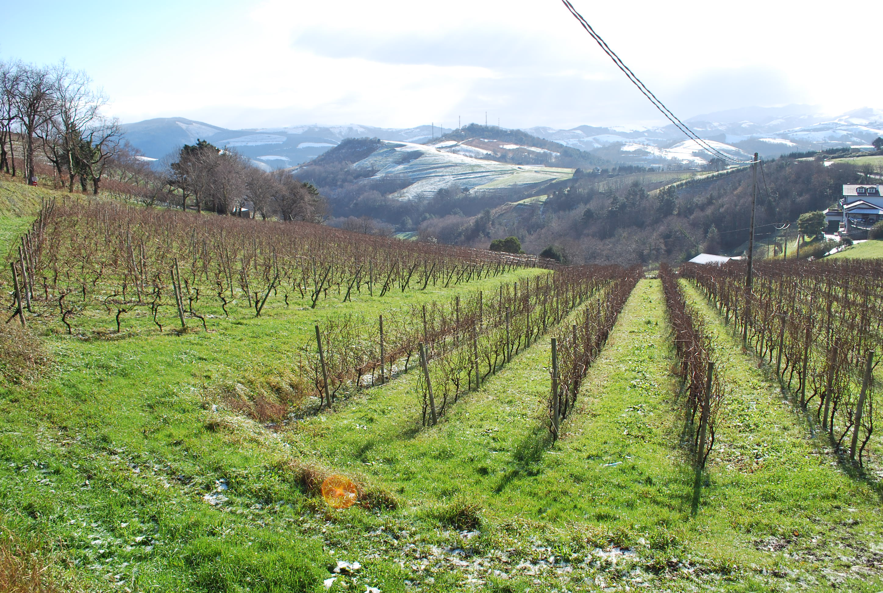 Vignes de Txakoli sur les pentes du camping à Zarautz (Guipuscoa).